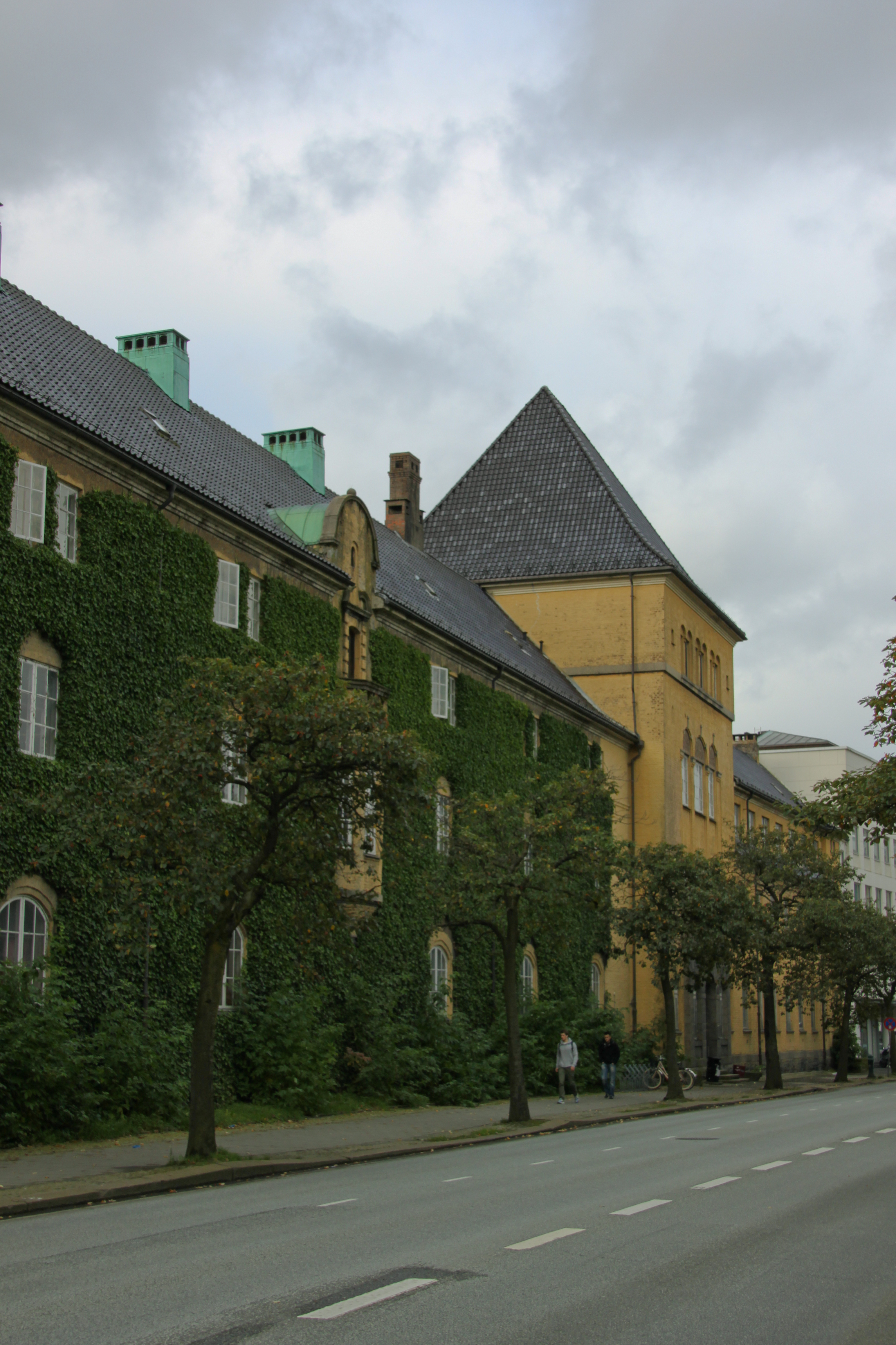 Nygård skole located in Bergen, Norway